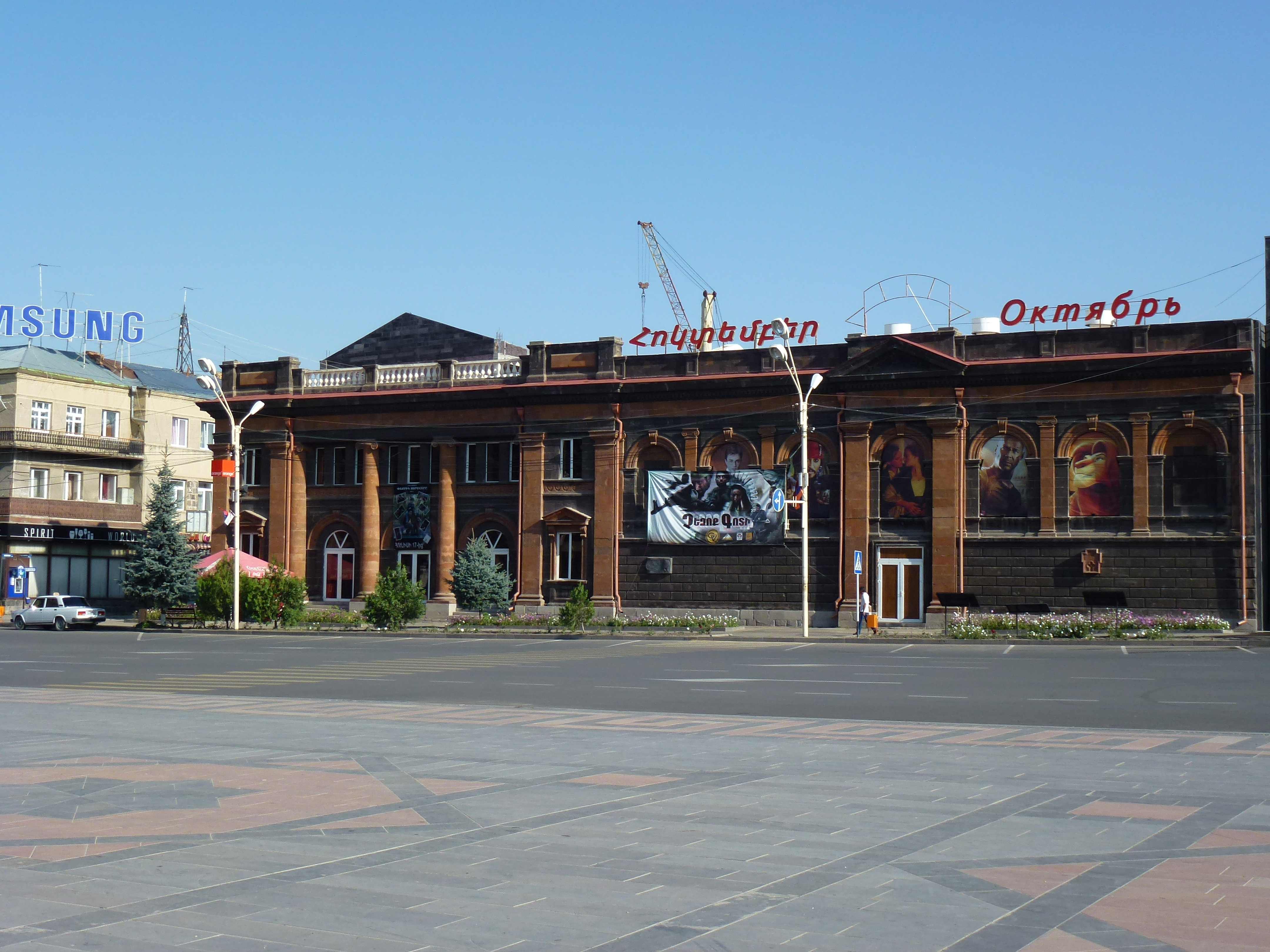 Գյումրու Կինոհոկտեմբեր թատրոն 1/4.928